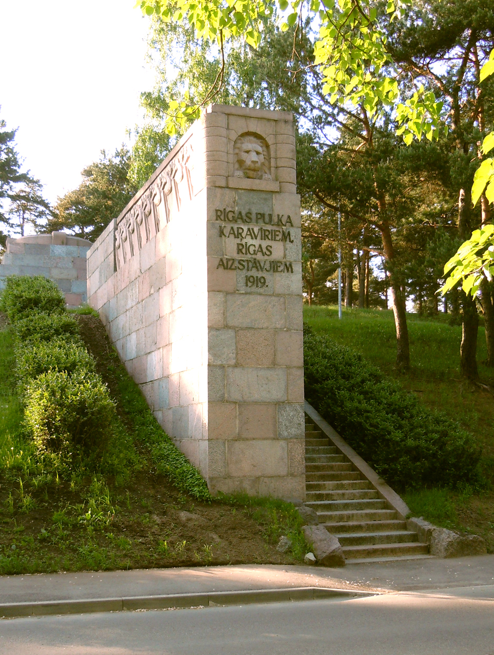 Мемориальный комплекс "Судрабкалниньш". Архитектор Эрнест Шталберг, скульптор Карл Зале. Рига, Иманта. 1937 год.